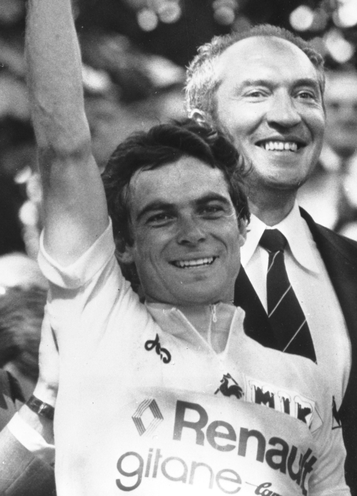 Bernhard Hinault tijdens huldiging Tour de France